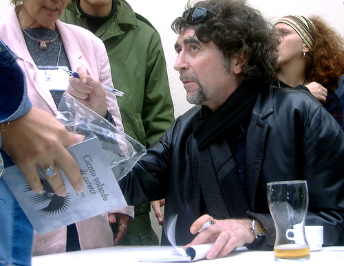 Joaquín Sabina firmando libros en La Habana, Cuba